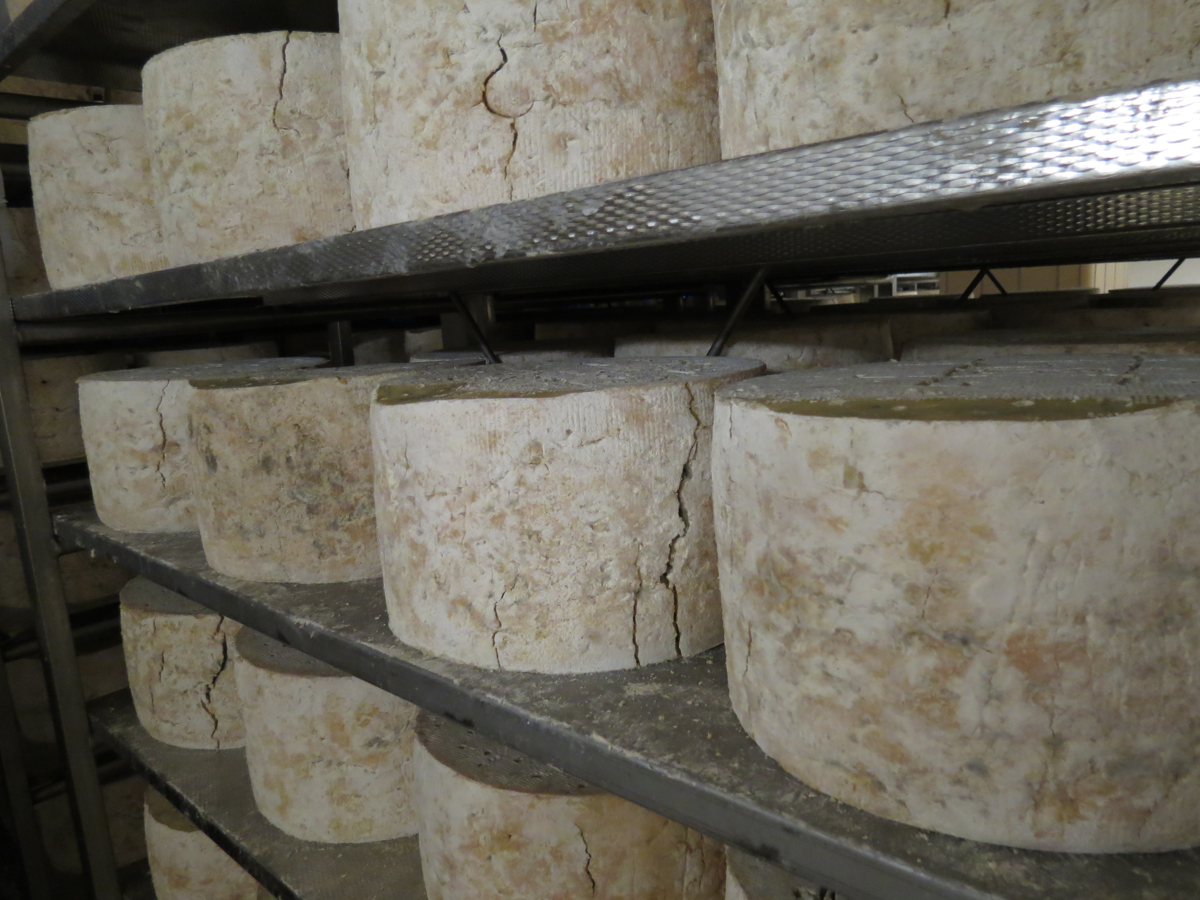 Détail d'une étagère de gorgonzola à la fromagerie Mauri